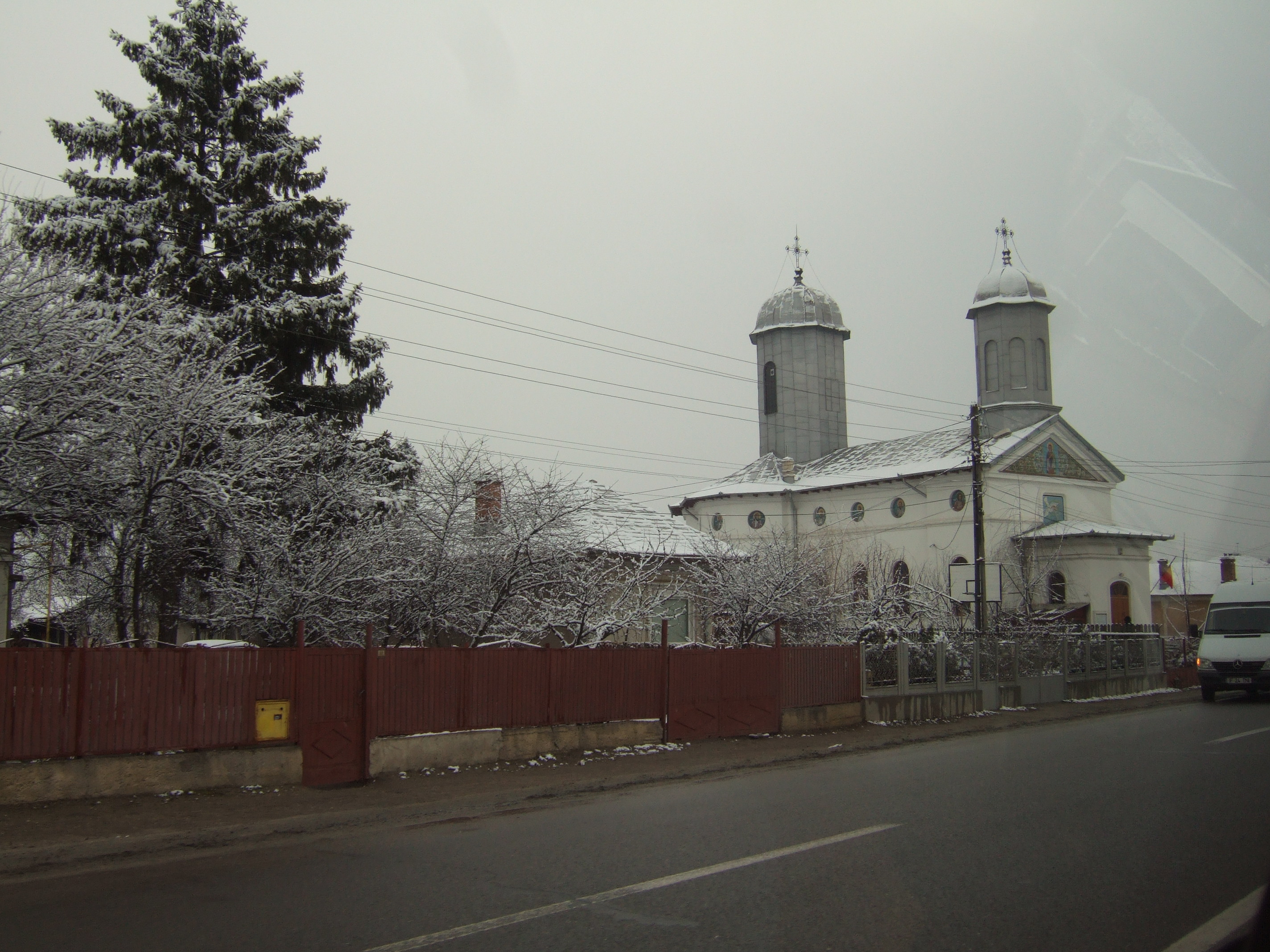 Biserica din Cornetu